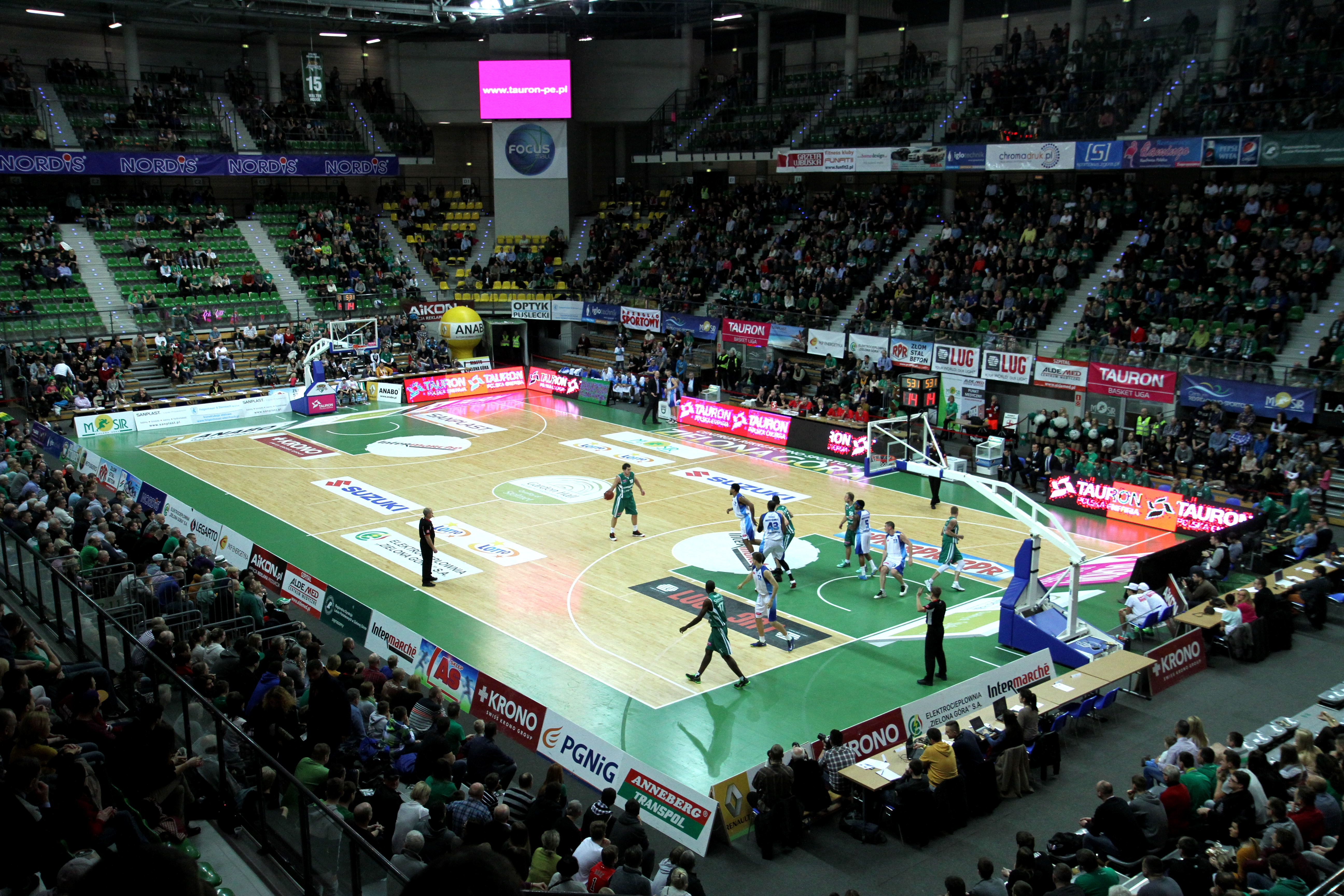 Mecz koszykówki, Tauron Basket Liga, Stelmet Zielona Góra